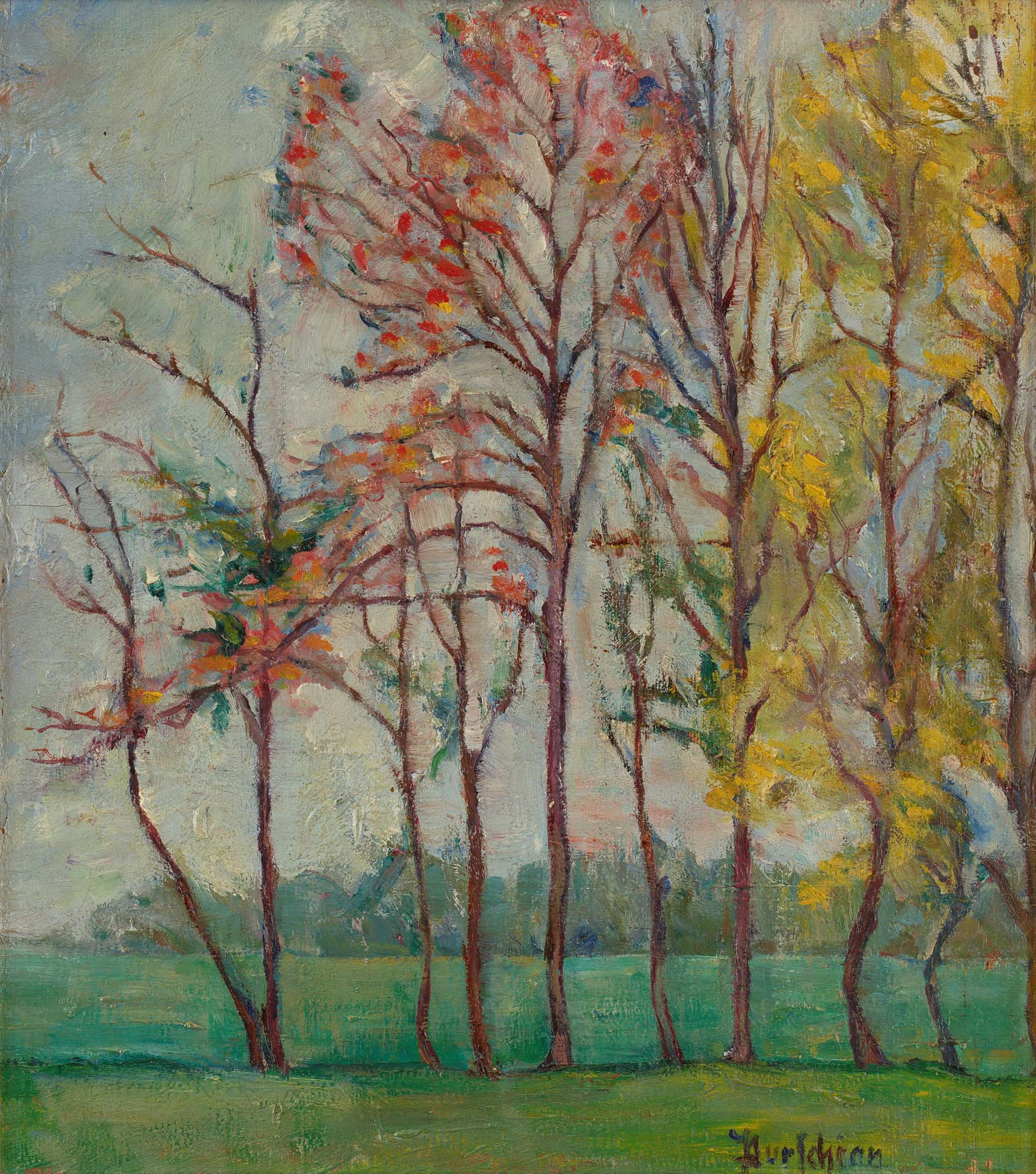 Bäume im Herbst. Ein Gemlde der Berliner Malerin Doramaria Purschian.